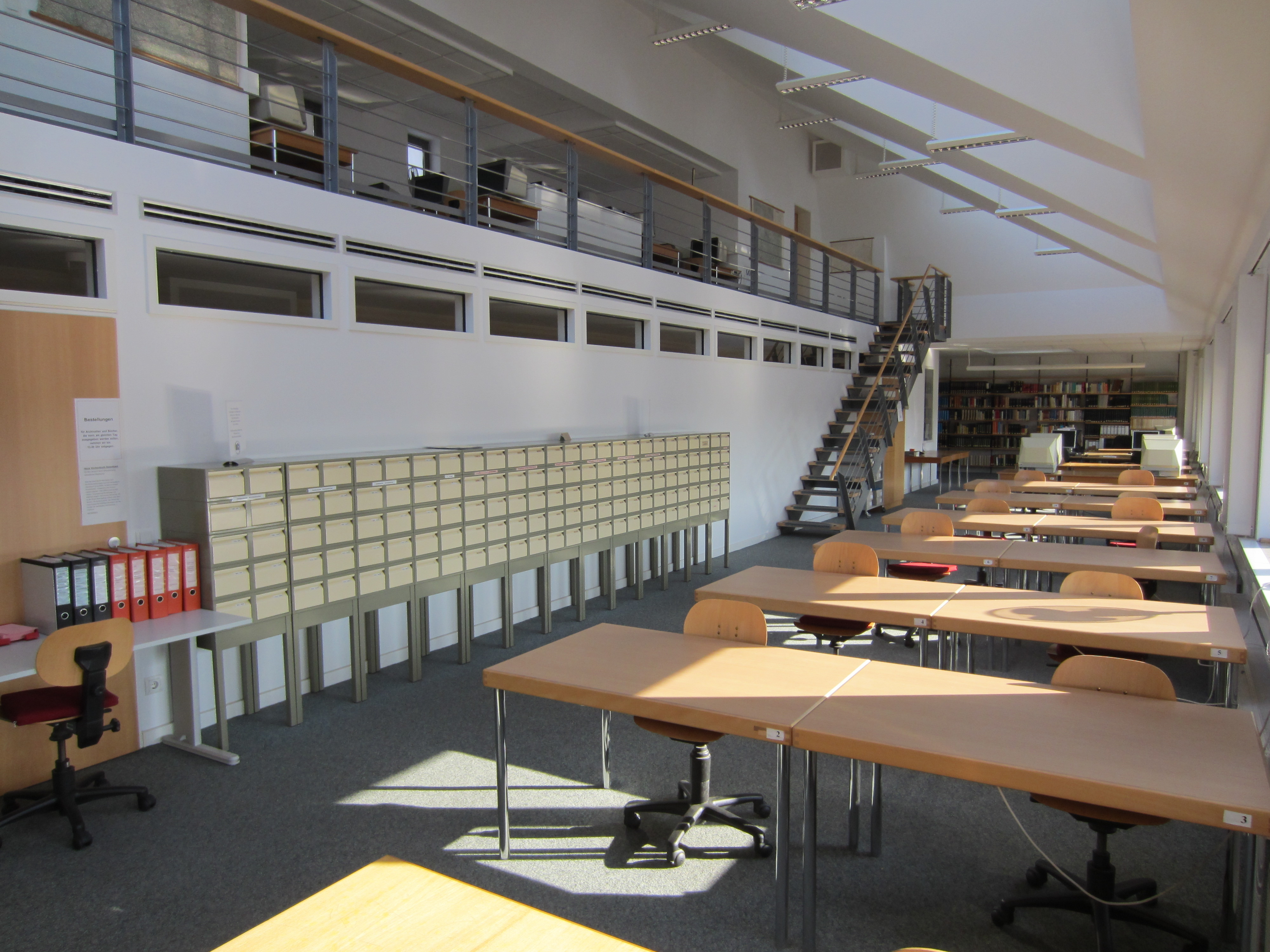 Benutzersaal des Evangelischen Zentralarchivs in Berlin